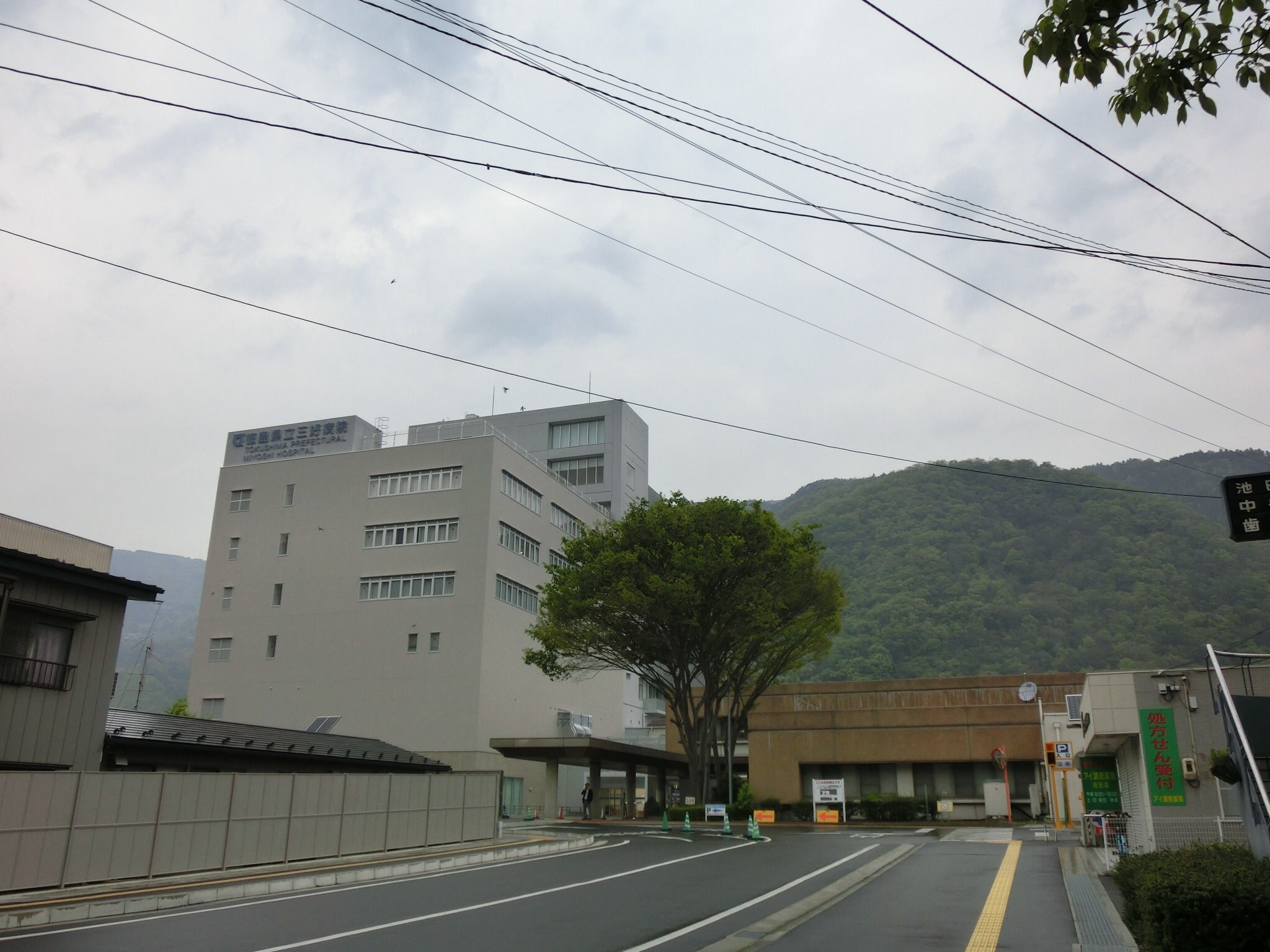 徳島県立三好病院